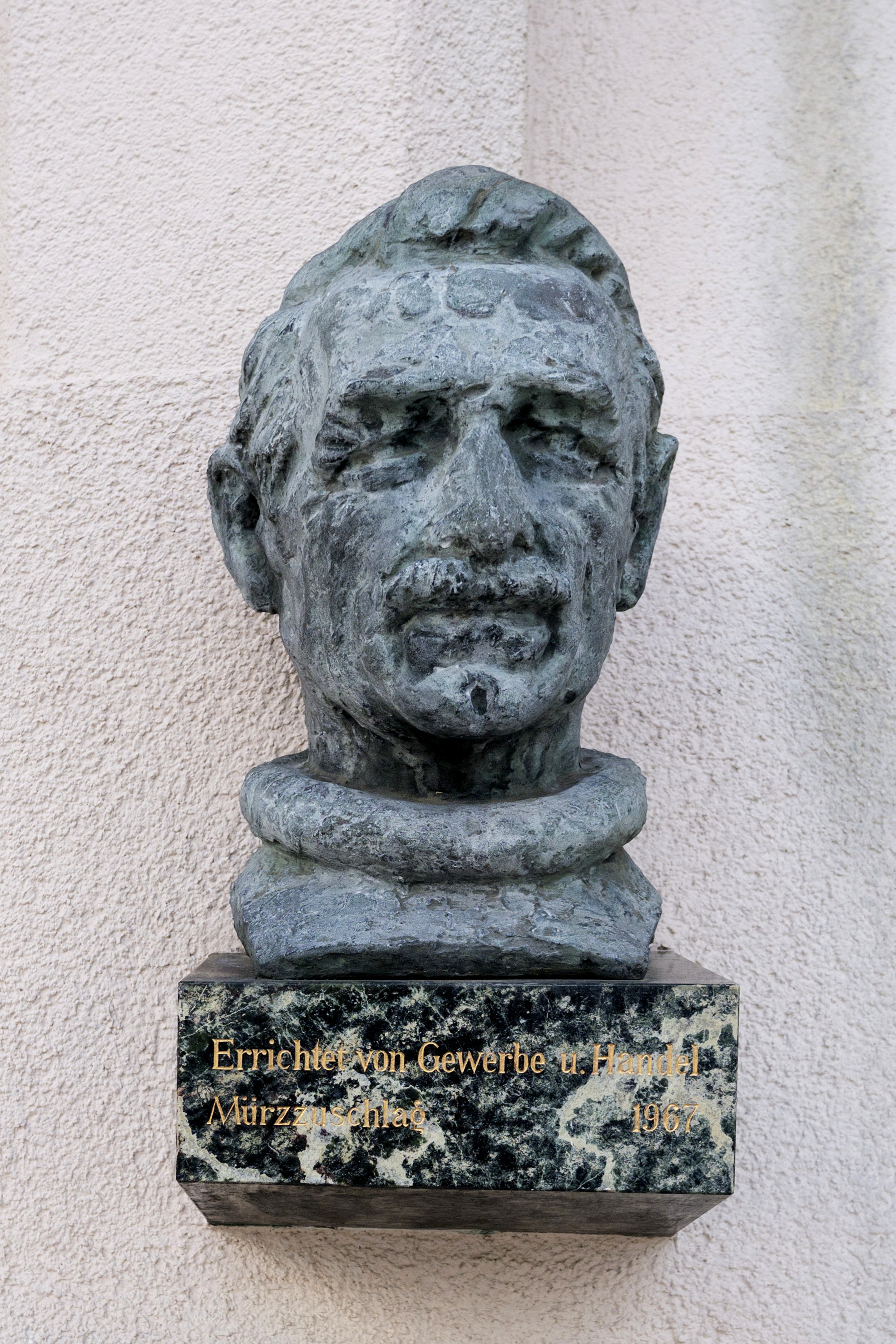 Wohn- und Geschäftshaus, sogen. Alte Ratsburg; Toni Schruf 1863 - 1932